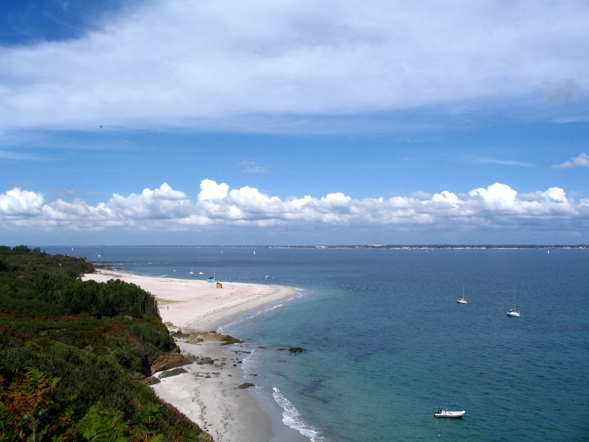 plage convexe de l'ile de Groix, France, façonnée par des courants, particuliers à cet endroit: cette forme de plage est exceptionnelle, les plages sont en général concaves